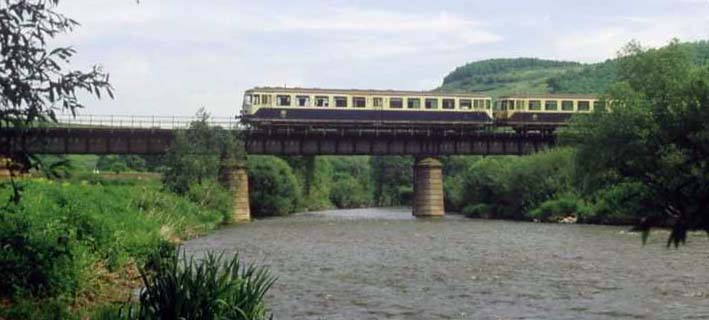 DB 515 536-1 im Jahr 1986 bei Überquerung der Nahe auf der Bayerischen Brücke zwischen Staudernheim und Odernheim